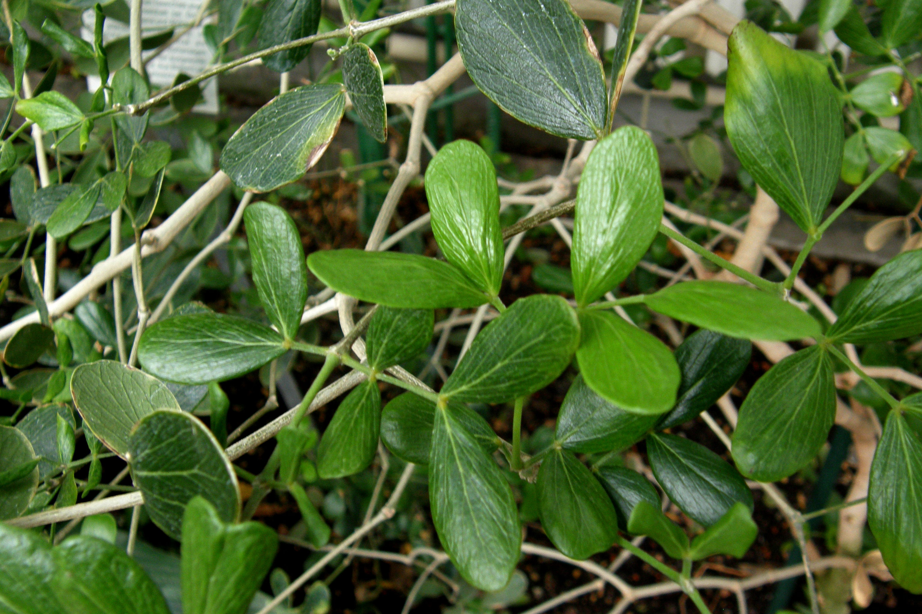 Feuilles de Guaiacum officinale L. dans la serre du Botanischer Garten de Berlin-Dahlem